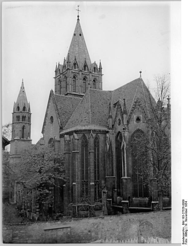 ADN-ZB-TBD-Wittig 19.11.1954 Das 1250-jährige Arnstadt Ubz.: Blick zur Liebfrauenkirche, rechts der Haupt- links der Meisterturm, im Vordergrund die gotische Hallenkirche.